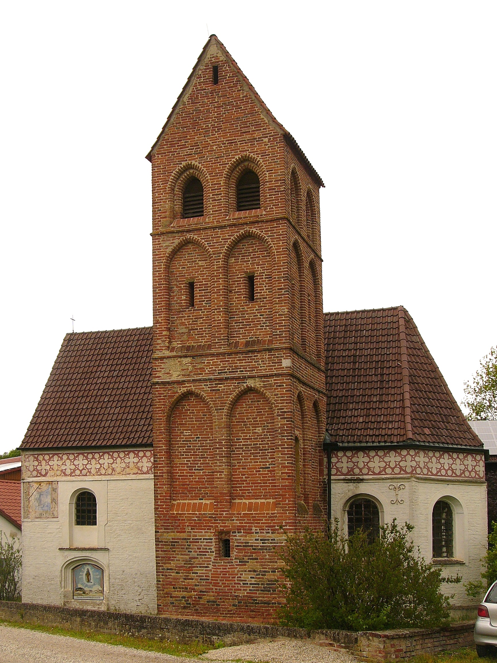 Kath. Kirche St. Ottilia; einfacher Saalbau mit netzrippengewölbtem Chor und unverputzter Südturm; 2. Hälfte 15. Jh.; mit Ausstattung; Friedhofsummauerung.This is a photograph of an architectural monument.